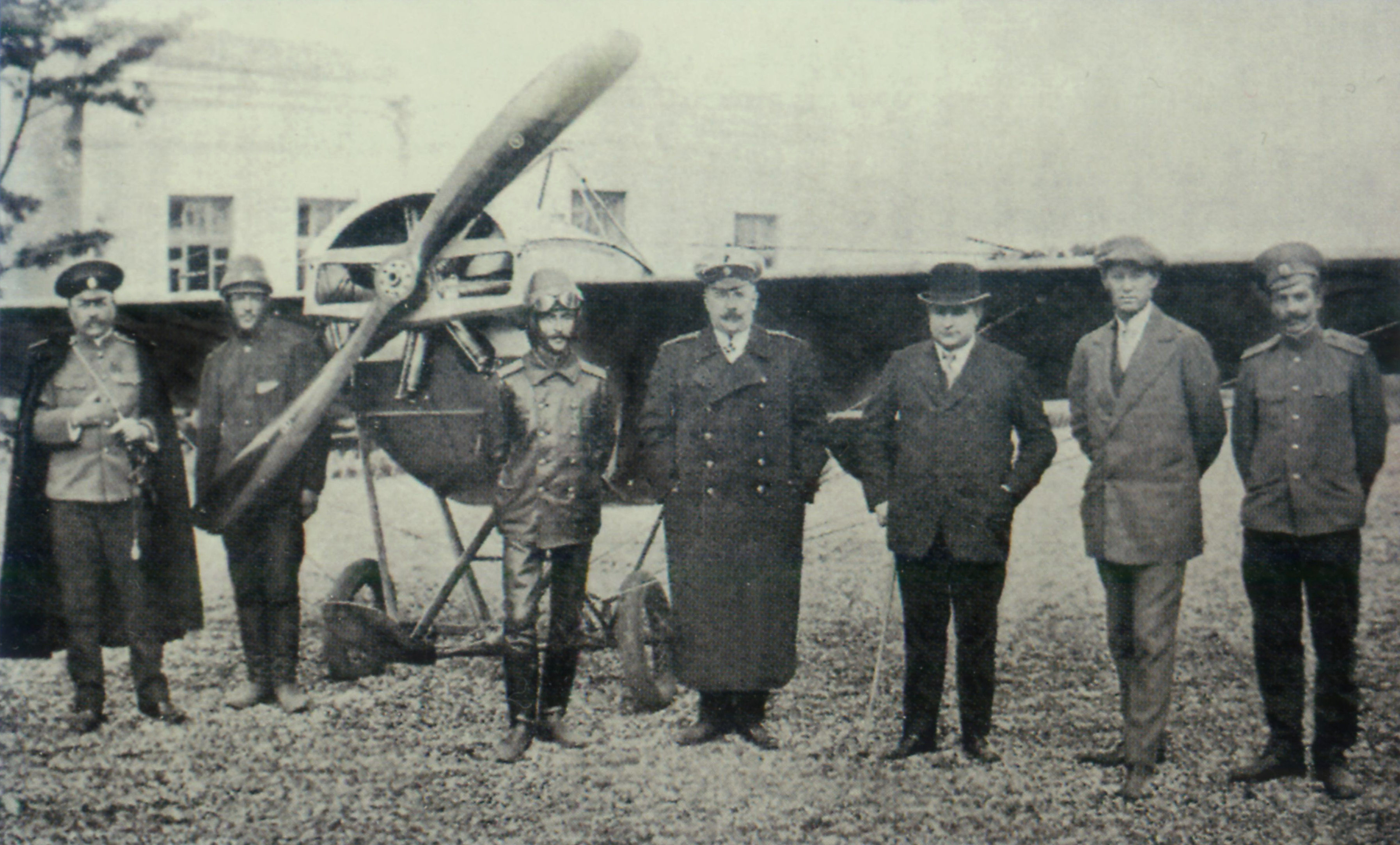 Представники одеського аероклубу: підполковник Х.Ф. Сарматьєв(в центрі) та А.А. Анатра серед інших представників одеського аероклубу